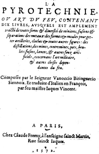 Copertina della traduzione in francese di Jaques Vincent.